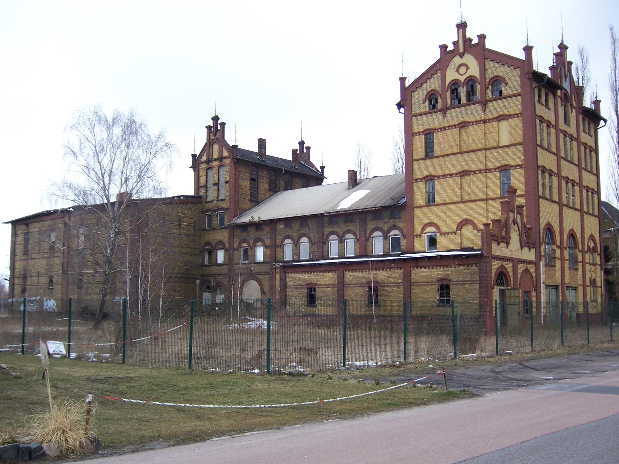 Kulturdenkmal "Brauerei" in Lutherstadt Wittenberg, Am Alten Bahnhof 33